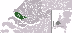 Kaart van Voorne-Putten, gemaakt uit sjabloon van Wikipedia-gebruiker Mtcv